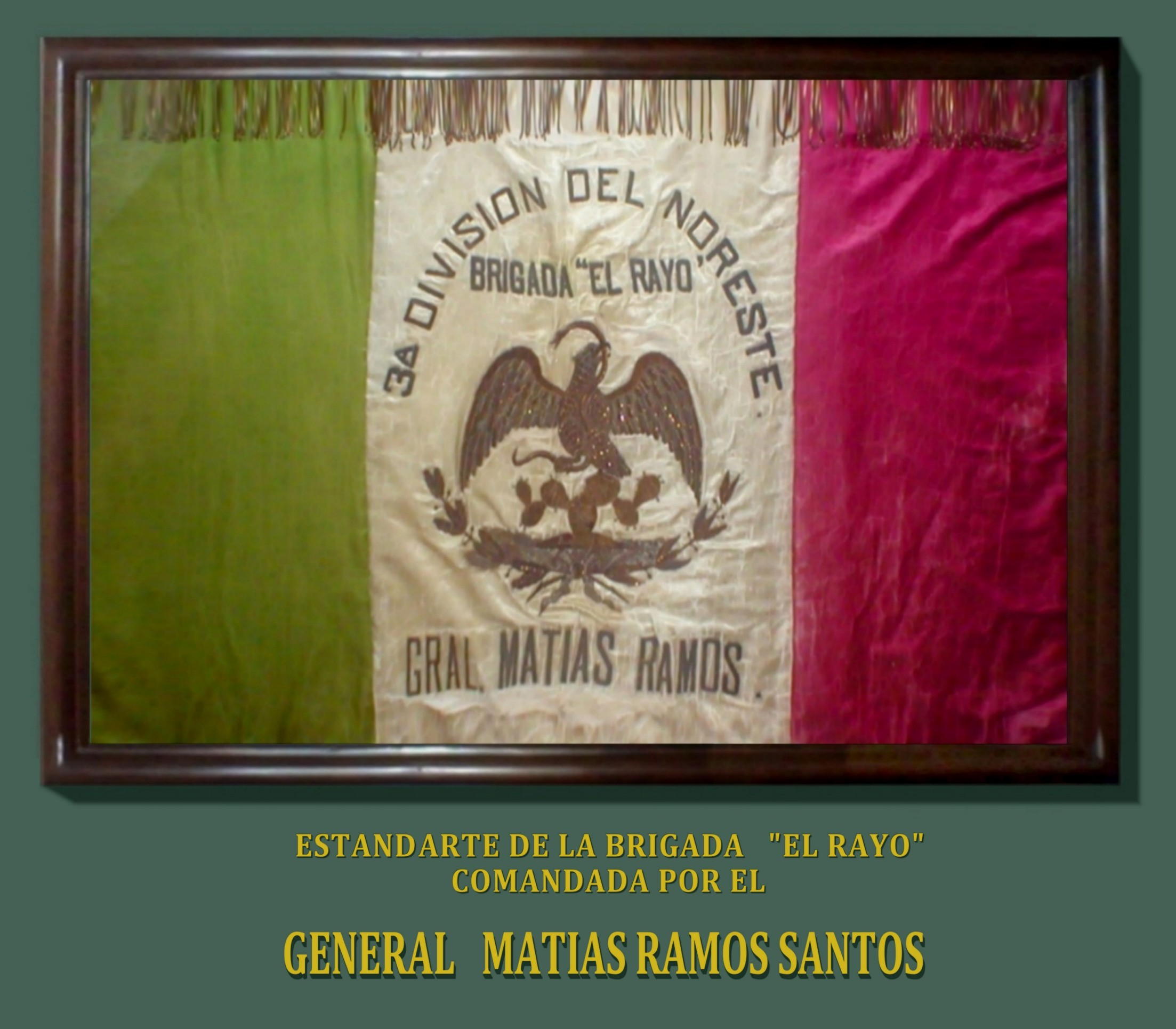 Foto tomada del estandarte original del General de División Matías Ramos Santos con el que emblemó su actuación militar en la 3ª División del Noreste en la revolución Mexicana.